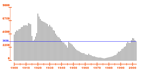 Chart showing the frequency the firstname Paul has been given in France Graphique permettant de voir combien de fois le prénom Paul a été attribué